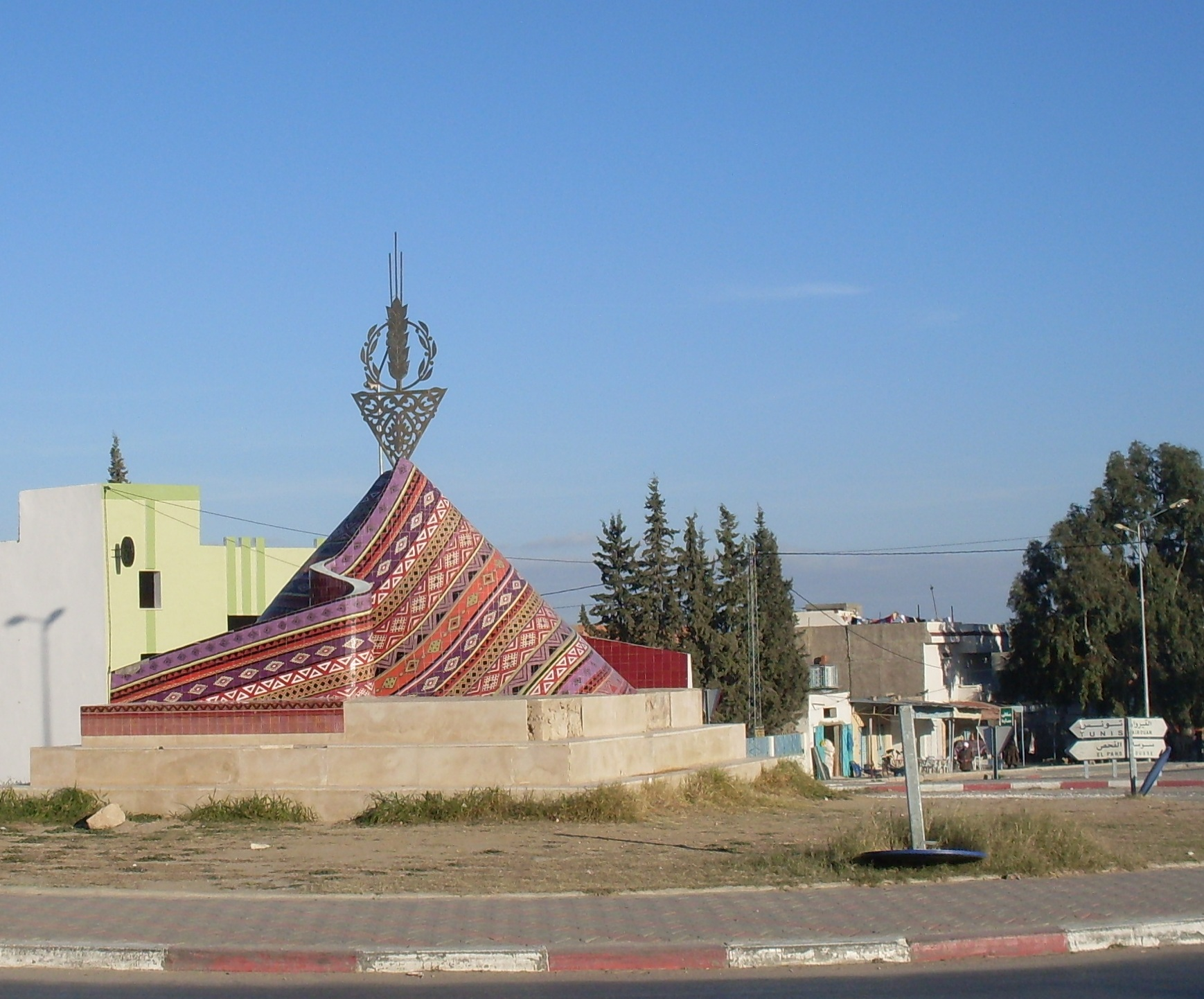 Centre ville d'El Baten dans les environs de Kairouan